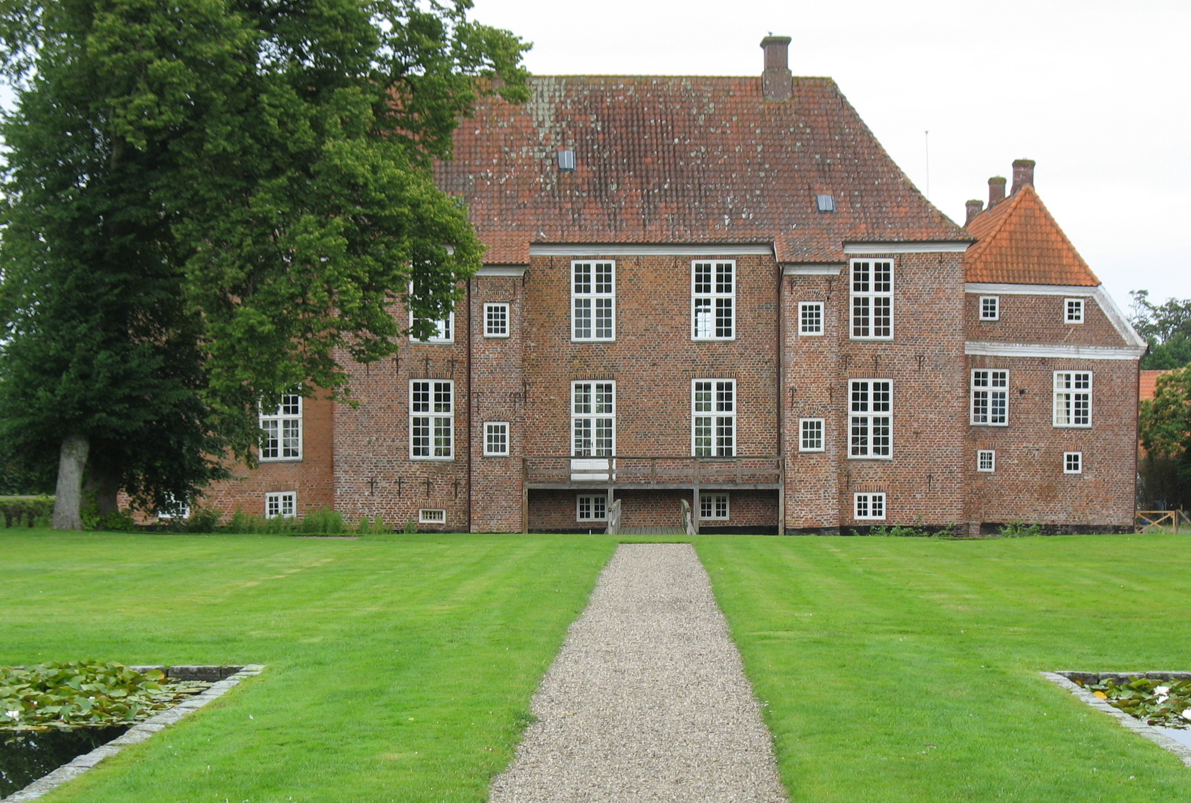 Gram Slot set fra sydvest (fra slotsparken)